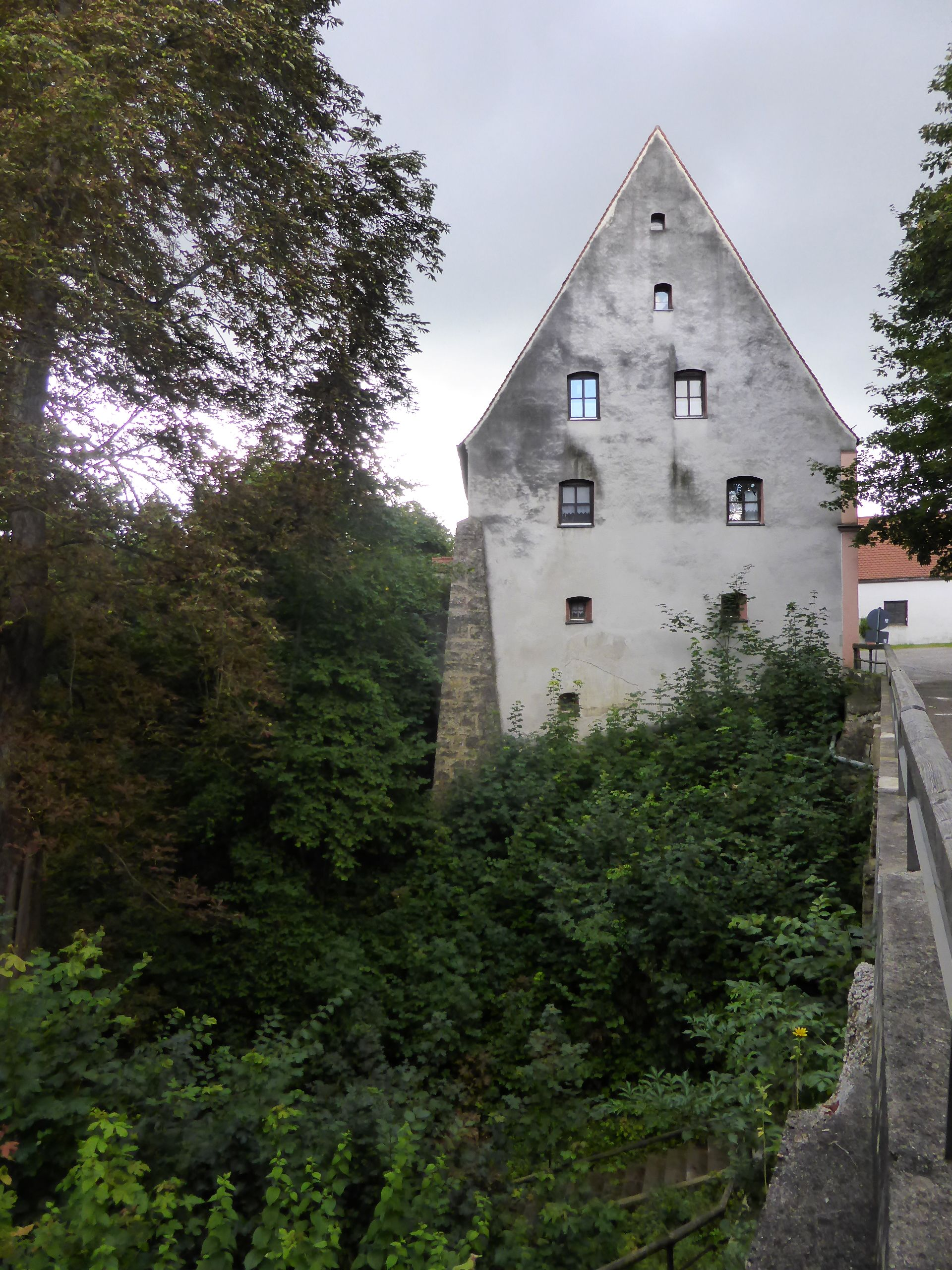 Pfleghaus in Wald an der Alz